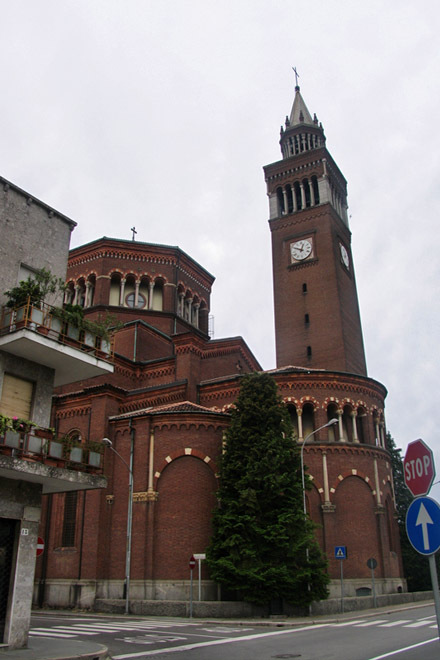 Castellanza